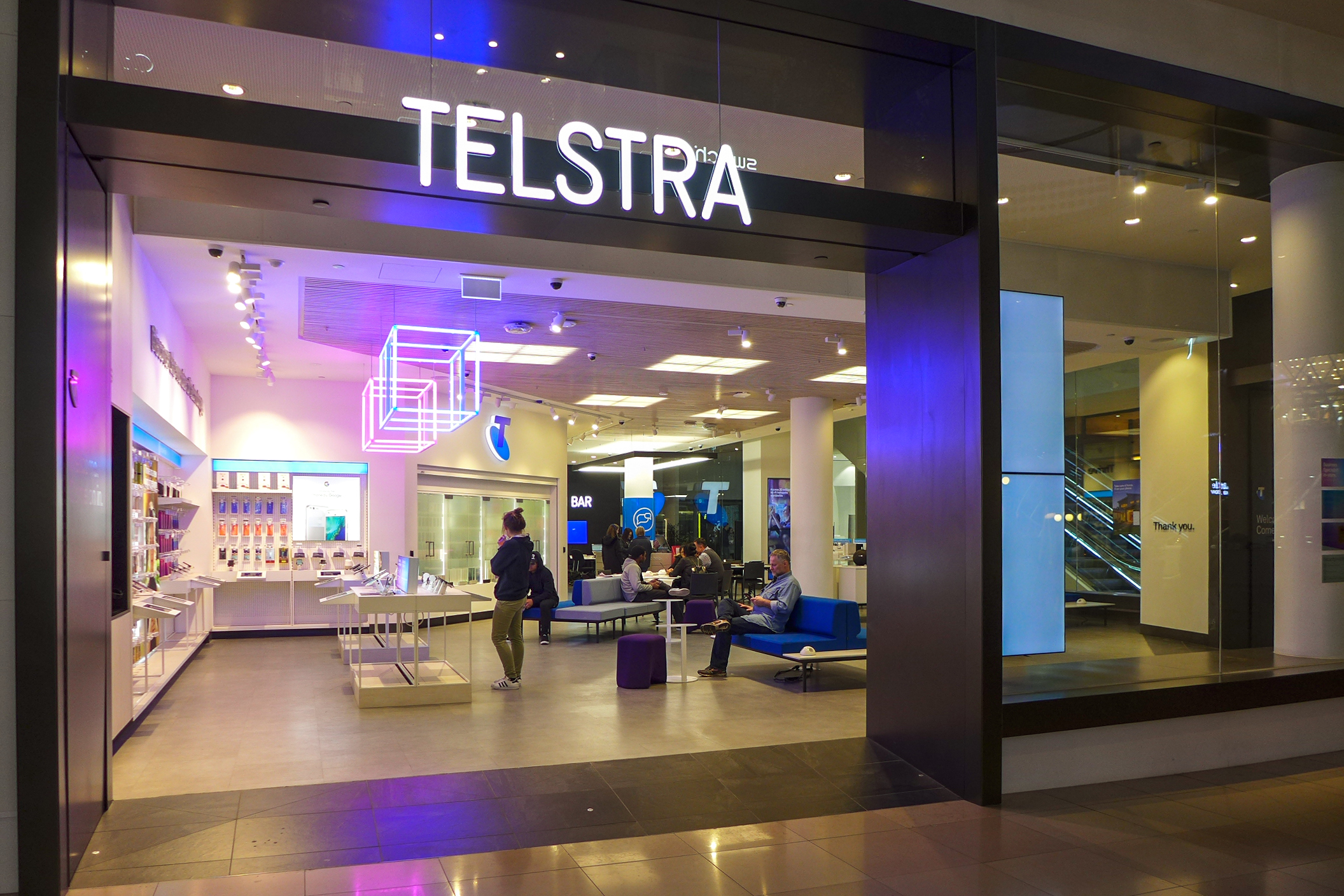 Telstra in Chadstone Mall